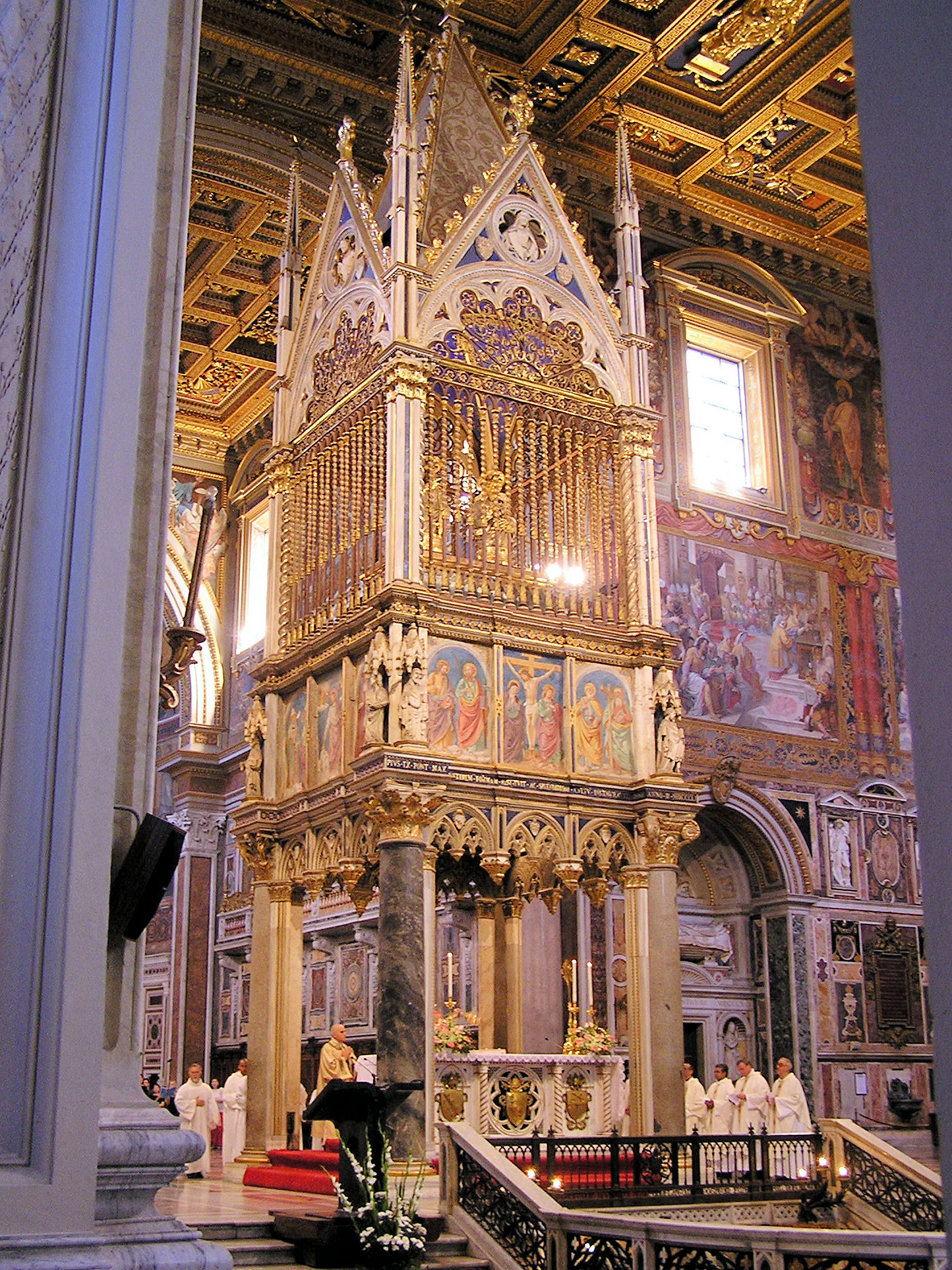 Baldaquin de la basilique Saint Jean du Latran à Rome